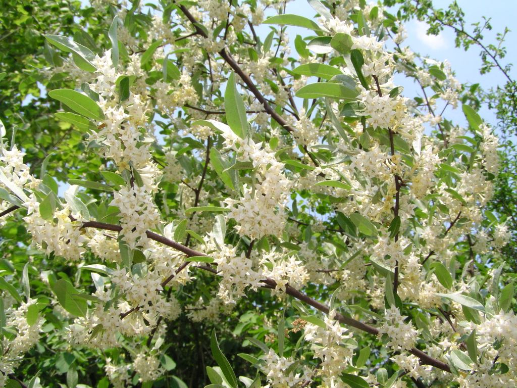 Korallen-Ölweide Blüte